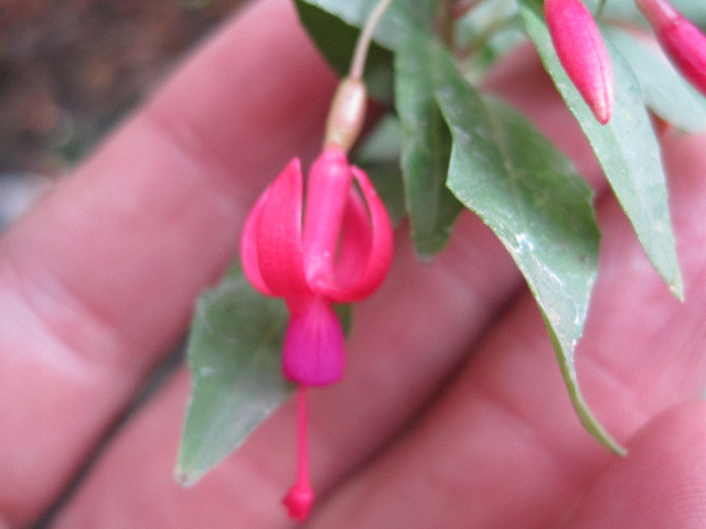 Esta es la fuchsia rosea, muchas veces confundida con f. lycioides